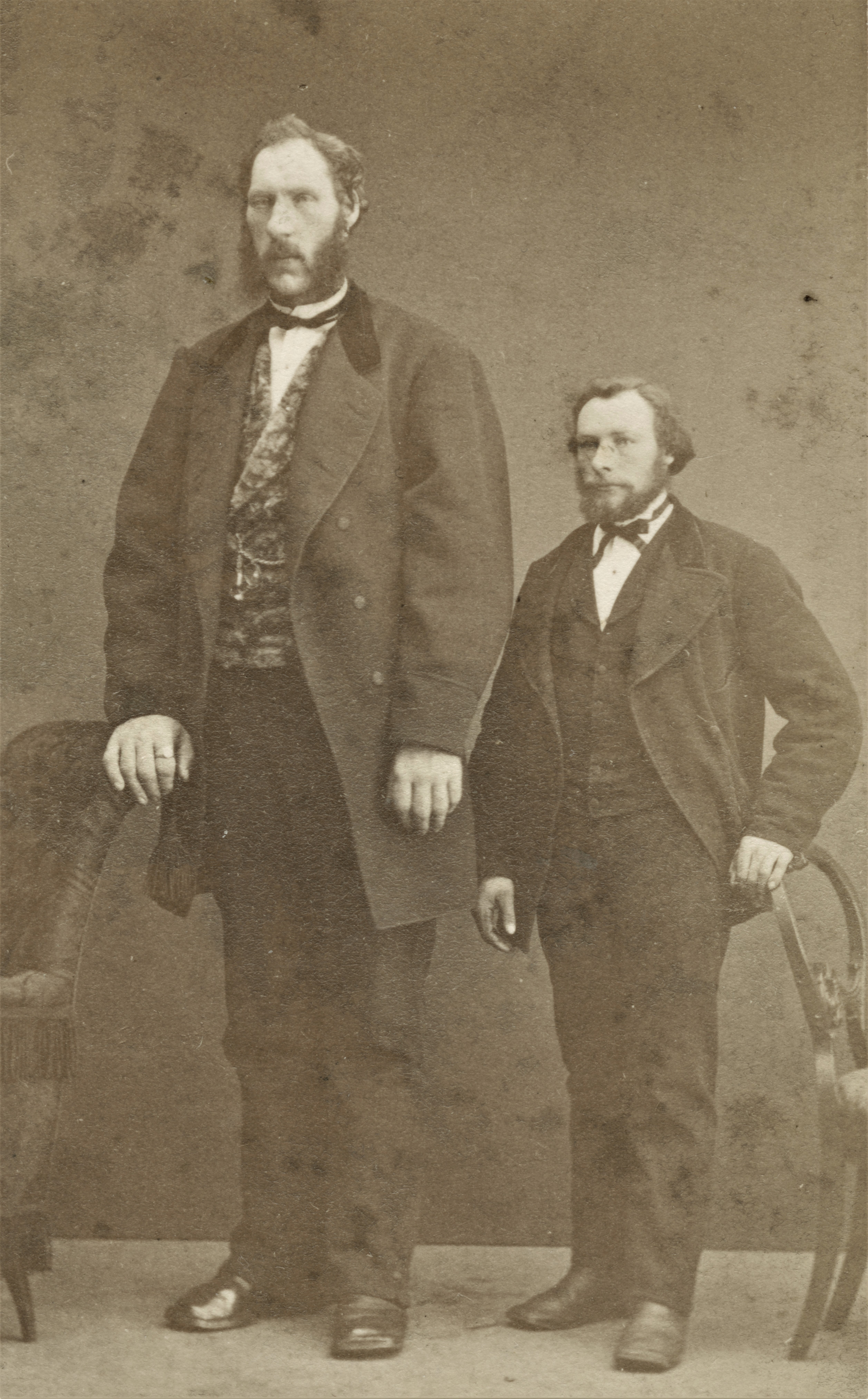 Henrik Brustad (1844–1899) fra Ytterøy sammen med en mann av normal vekst. Brustad var veldig lang og kraftig, og ble kalt "Store-Henrik" eller "kjempen Henrik".